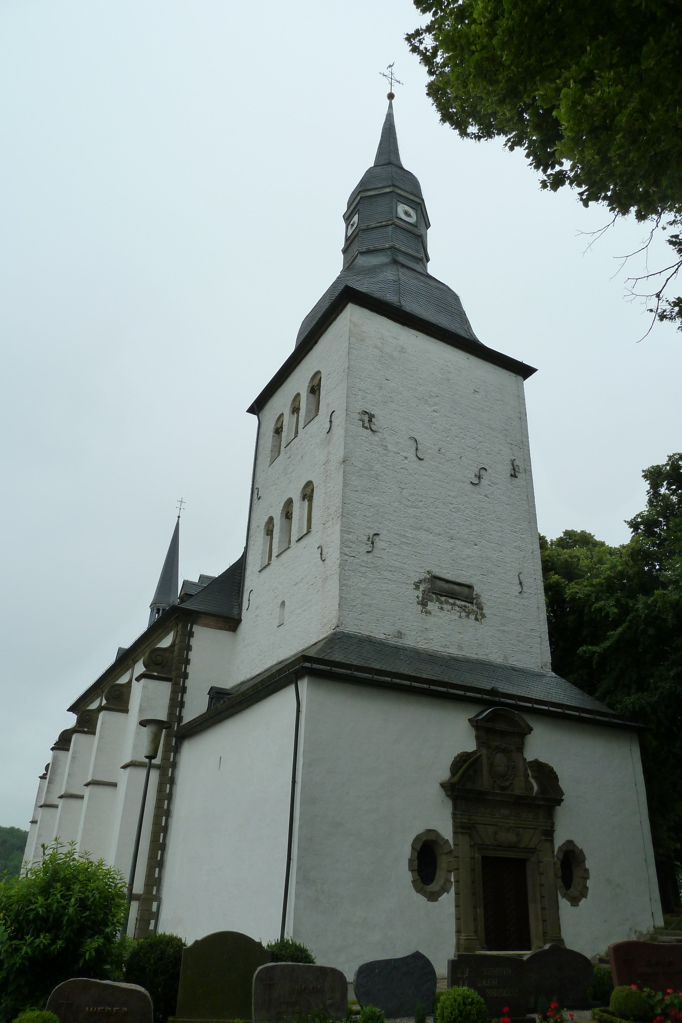 Die St.-Gervasius und St.-Protasius-Kirche in Rüthen-Altenrüthen.